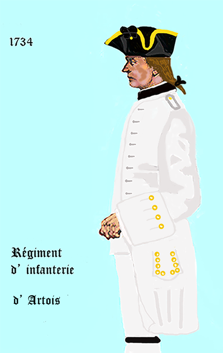 Uniform eines königlich französischen Infanterie-Regiments gemäß Dekret von 1734. - Entnommen und überarbeitet aus: „LES UNIFORMES ET LES DRAPEAUX DE L'ARMÉE DU ROI“ Marseille 1899.